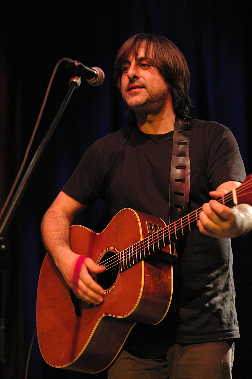 Ezio Lunedei, Ezio (Band), Auftritt als Duo in der Lindenbrauerei, Unna, 23.03.2007